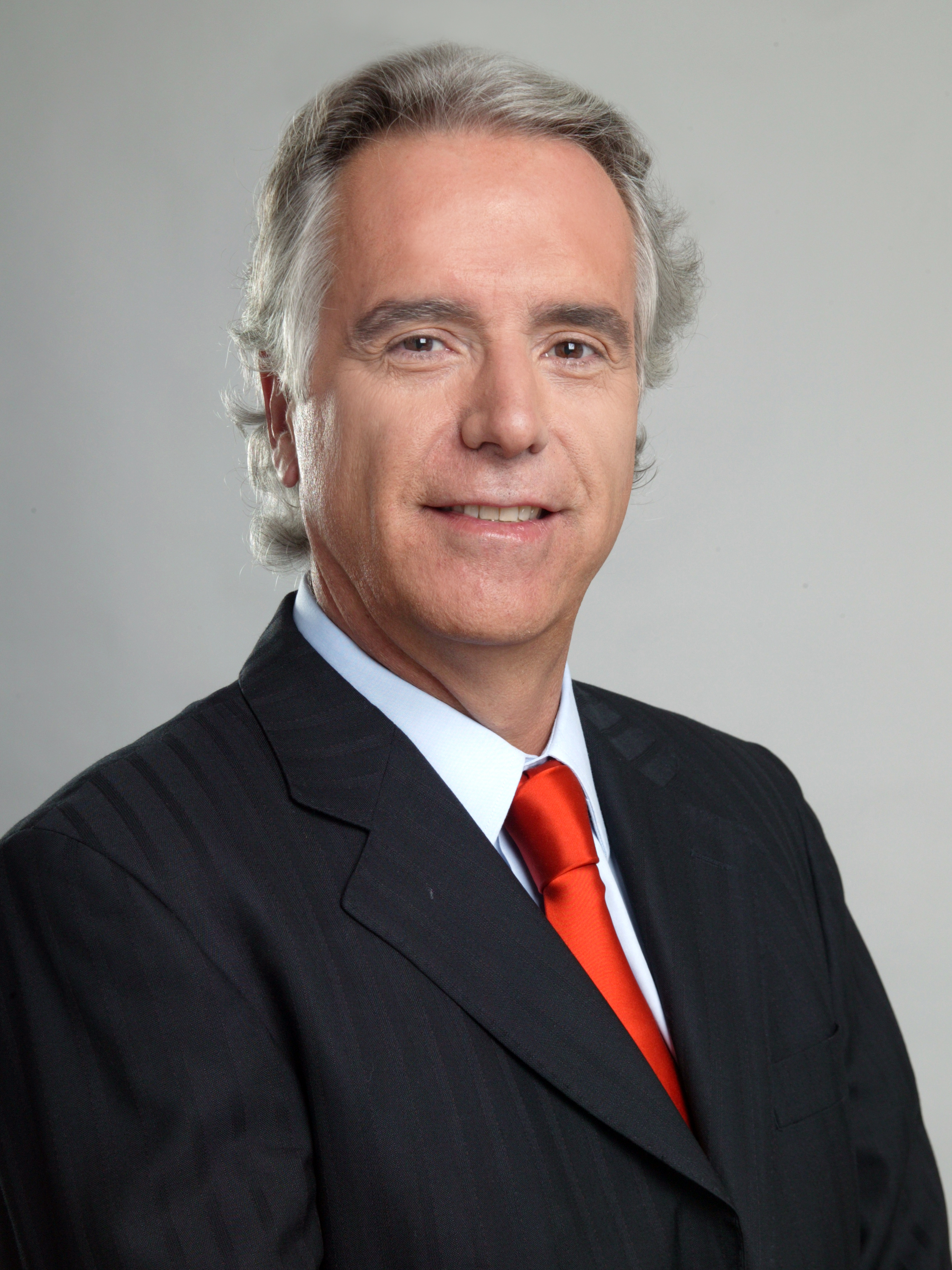 Felipe Morandé, economista chileno.